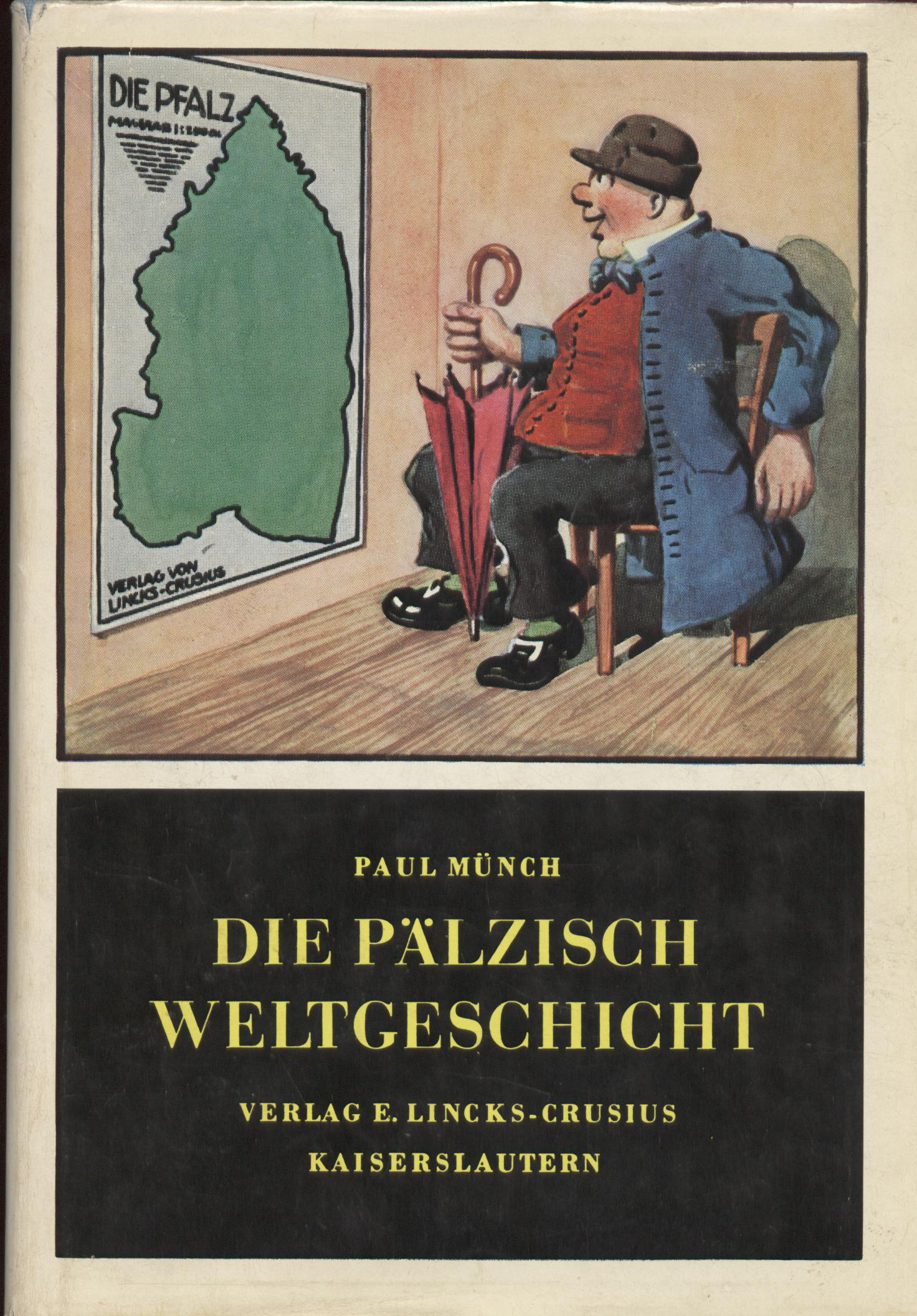 Paul Münch, Pfälzer Heimatdichter